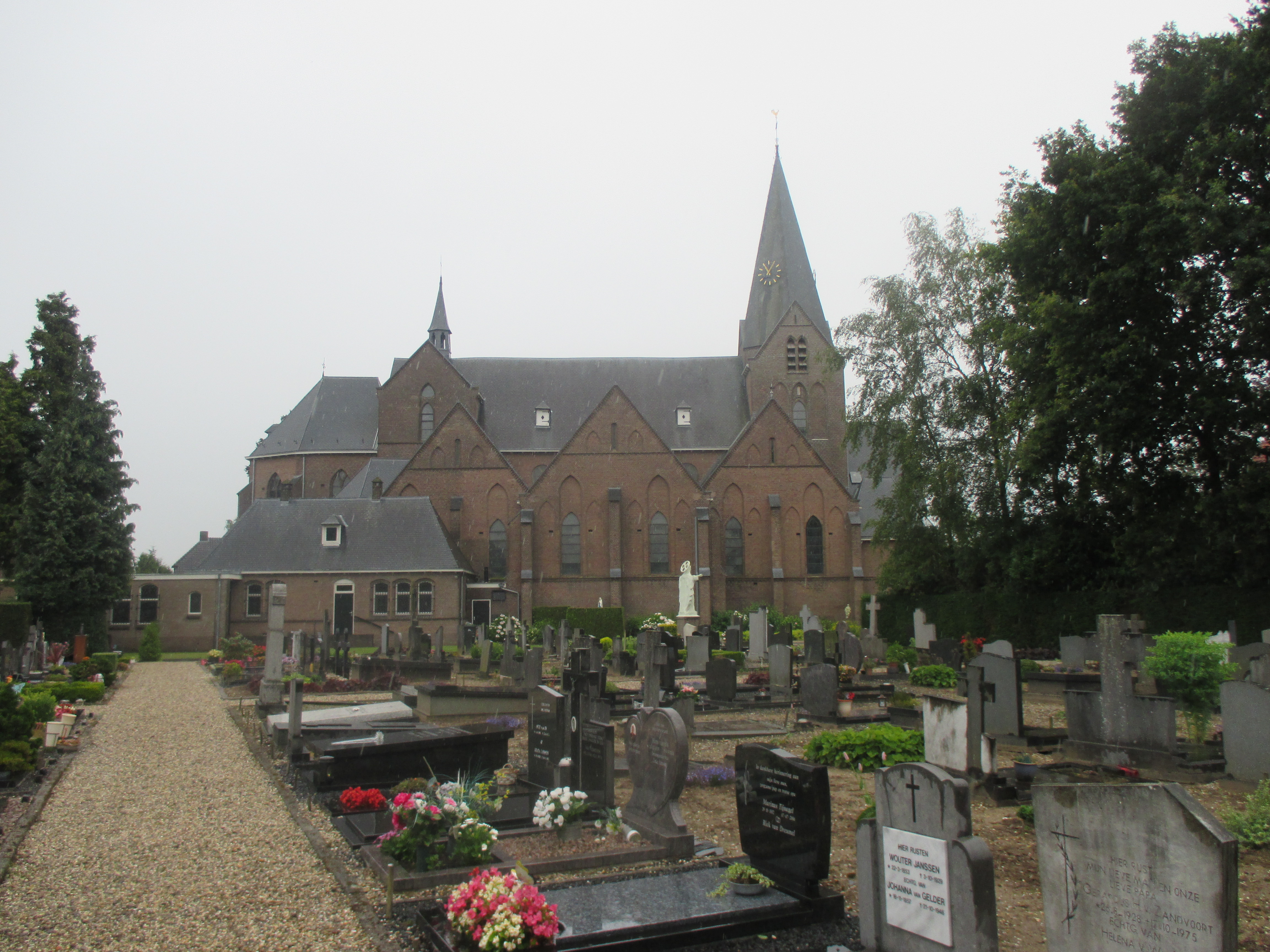 Neogotische basiliek HeiligeWillibrordus te Boven-Leeuwen